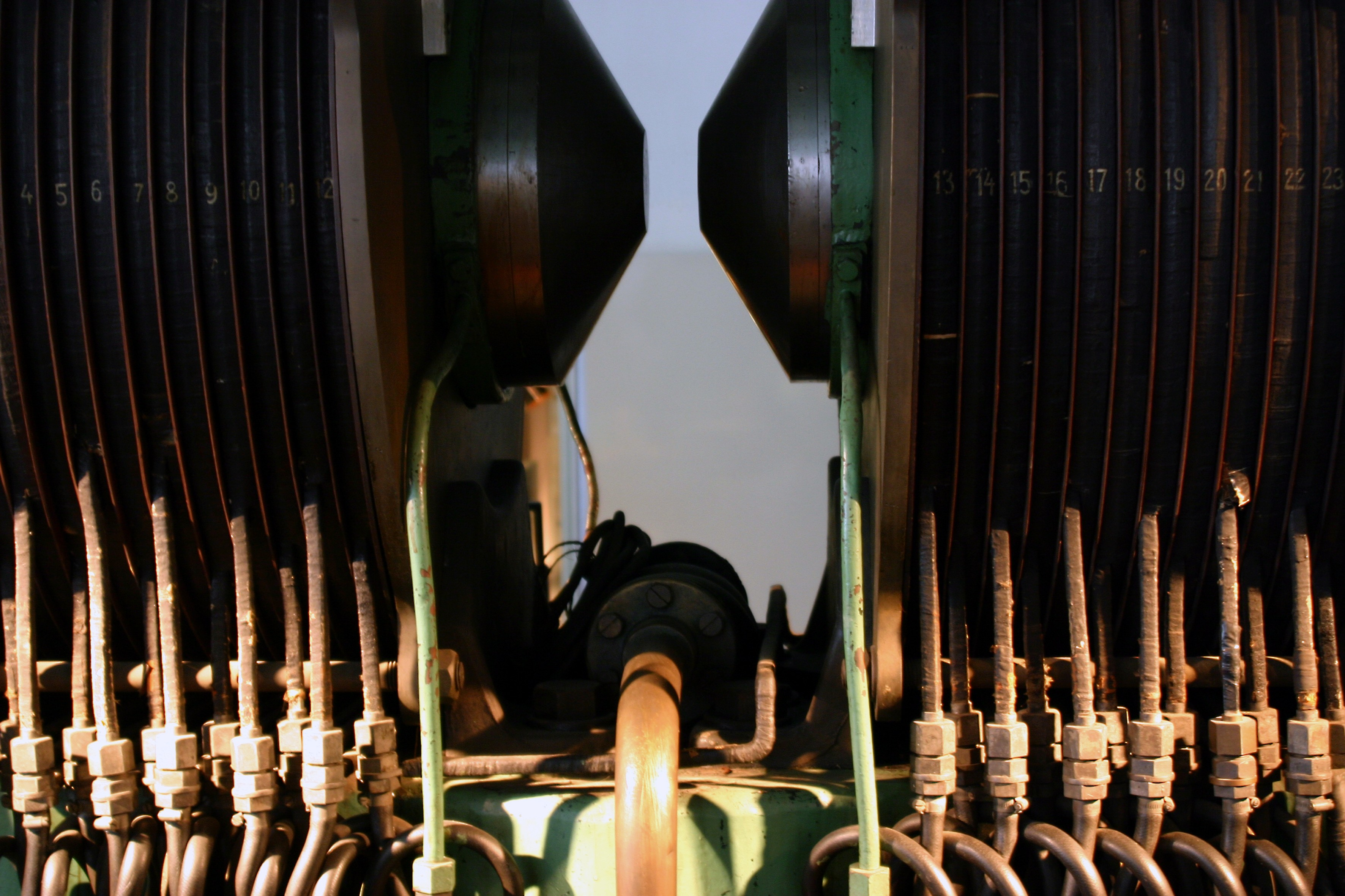 Museum Boerhaave, Leiden - Giant Electromagnet dimensions: w 247 cm h: 248 cm d: 200 cm signature: 'Siemens & Halske' ; period: 1930 Room 21